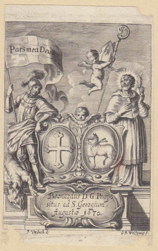 Ex libris, Augustinerchorherrenstift St. Georg, Augsburg, Propst Bernardus ?